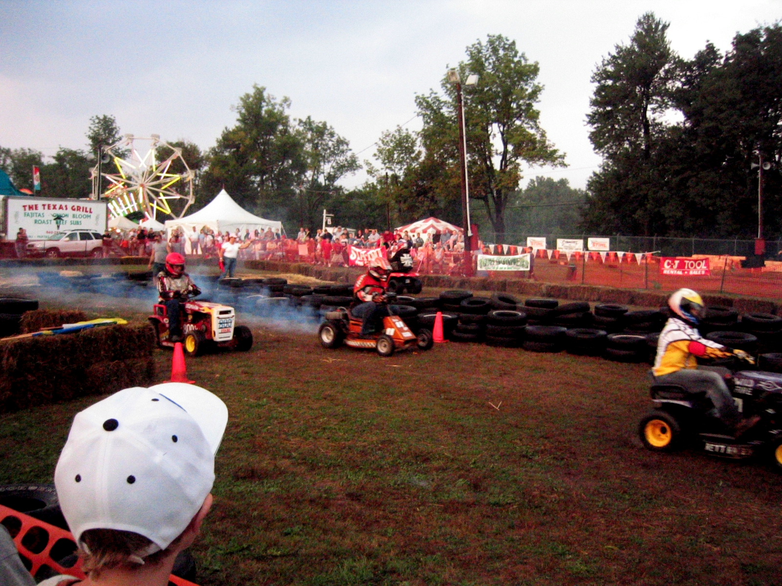 Lawnmower racing